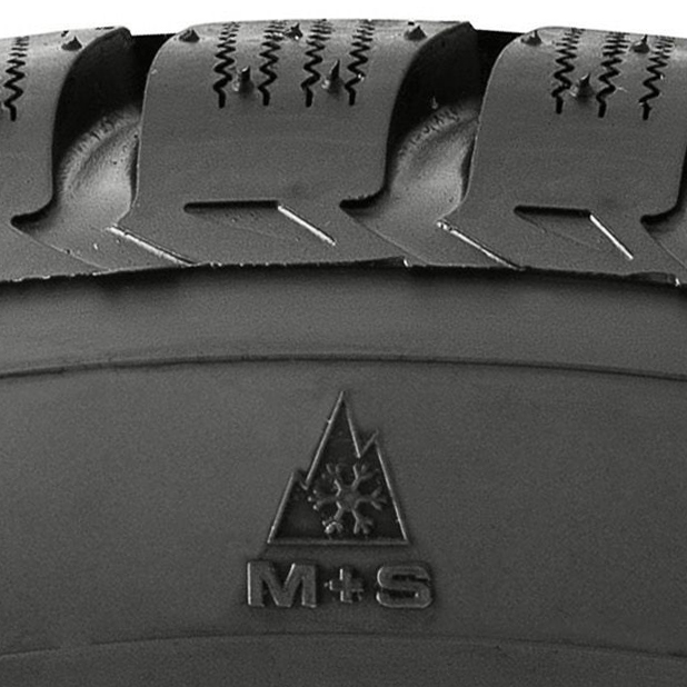 Detalle símbolo alpino 3PMSF en neumático Lassa Snoways 3